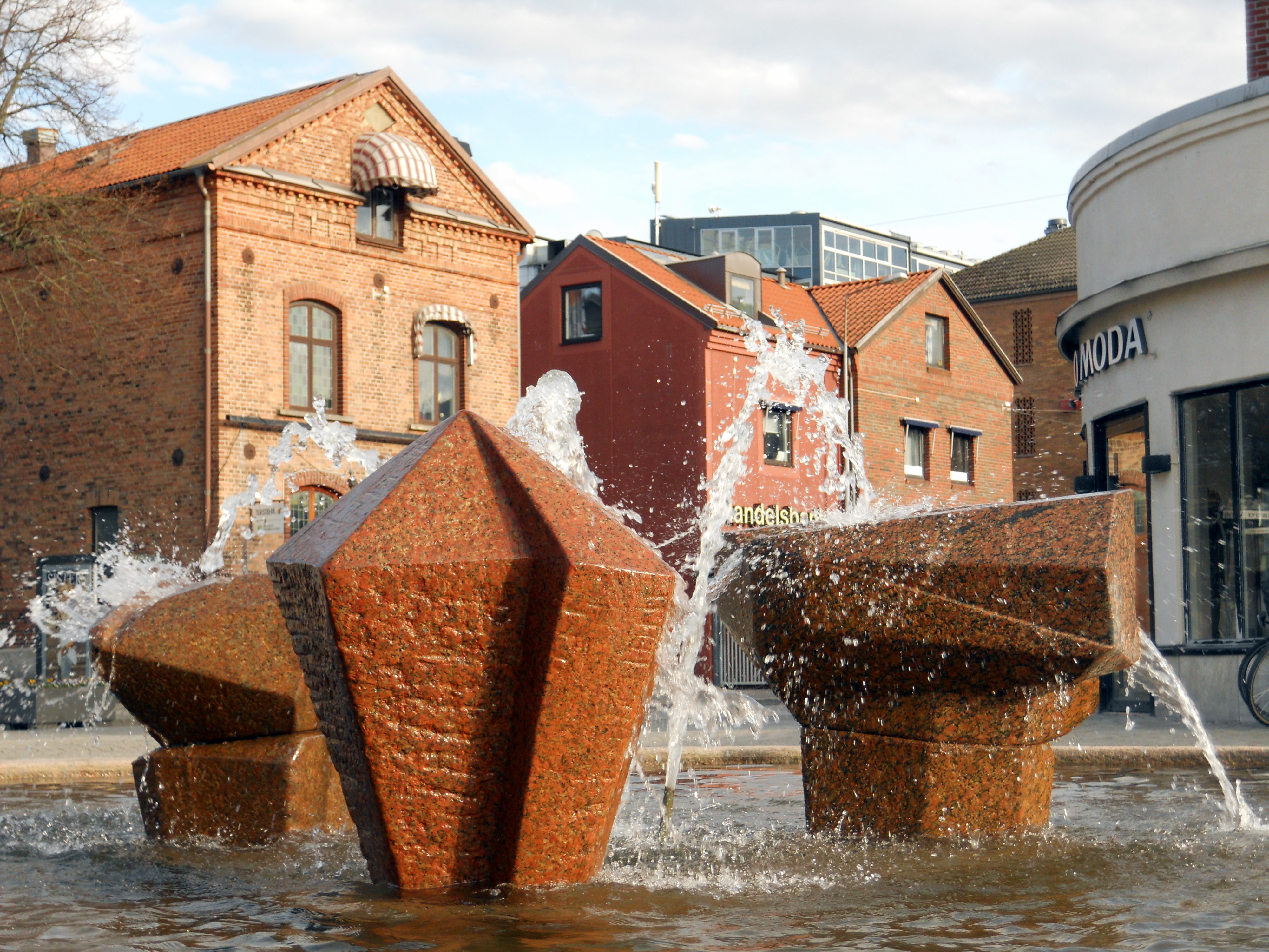 Torellbrunnen av Edvin Öhrström, Varberg, Sverige.